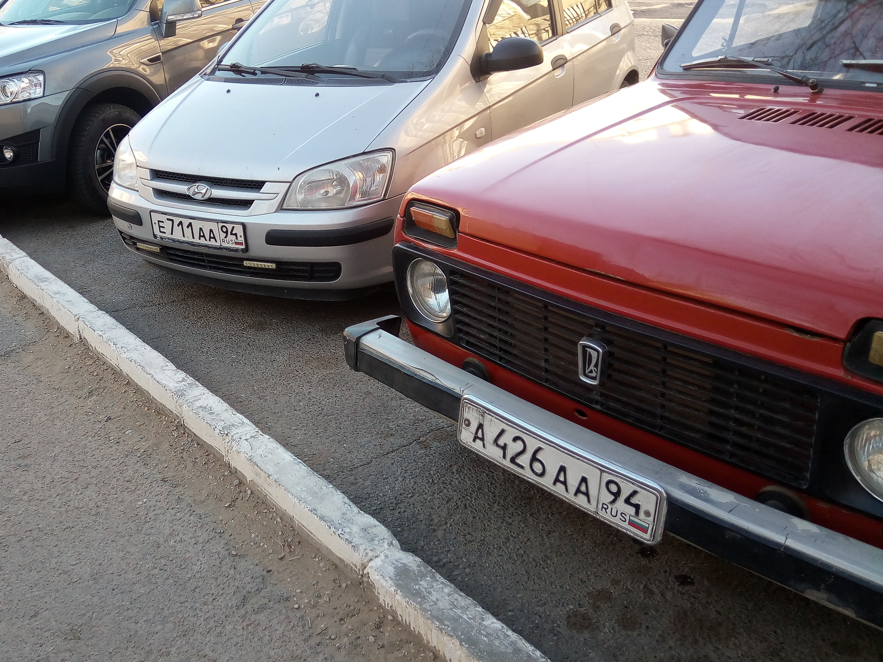 Автомобили в Байконуре